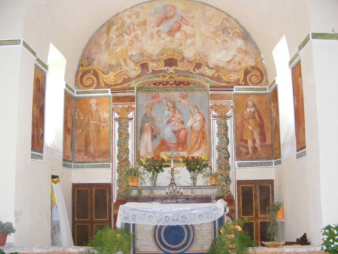 Presbiterio della chiesa della Madonna della Neve situata in Paranzano (Casperia, Ri)